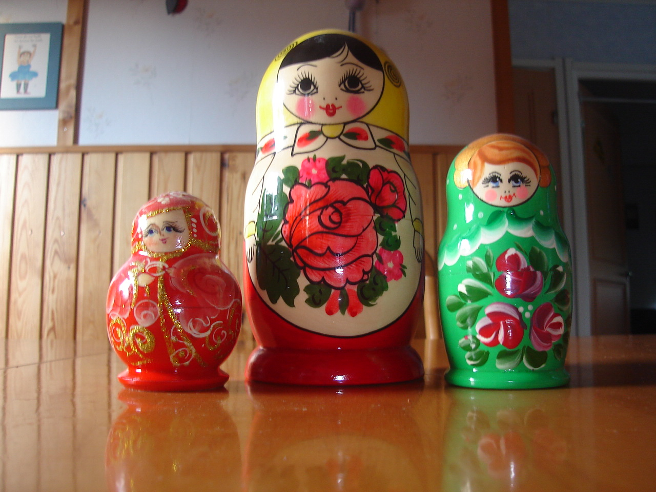 Matryoshka dolls